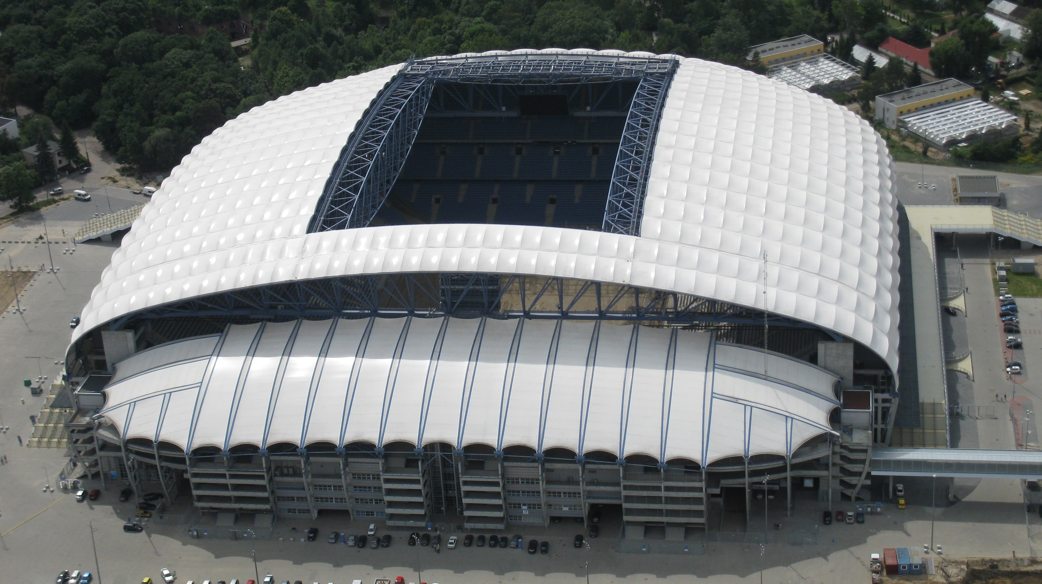 Stadion Lecha Poznan